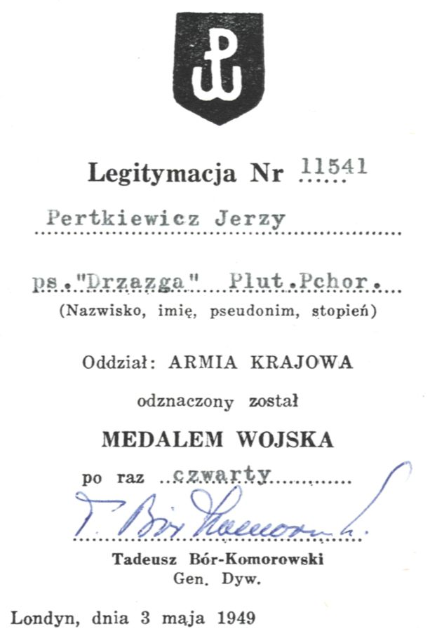 Medal Wojska (Army Medal) nadany jednorazowo, od razu po raz czwarty